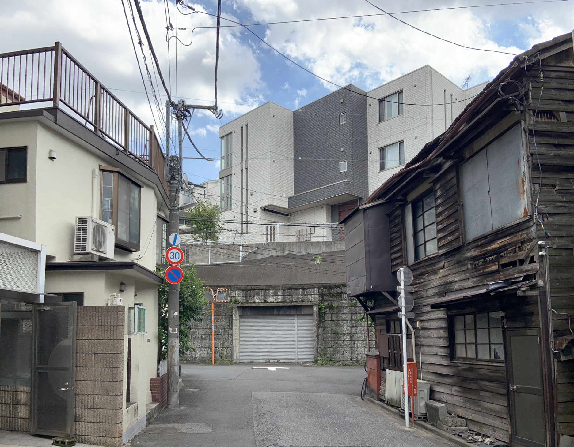 東京都の中野区・新宿区・渋谷区の三区区境。2019/09/12撮影。